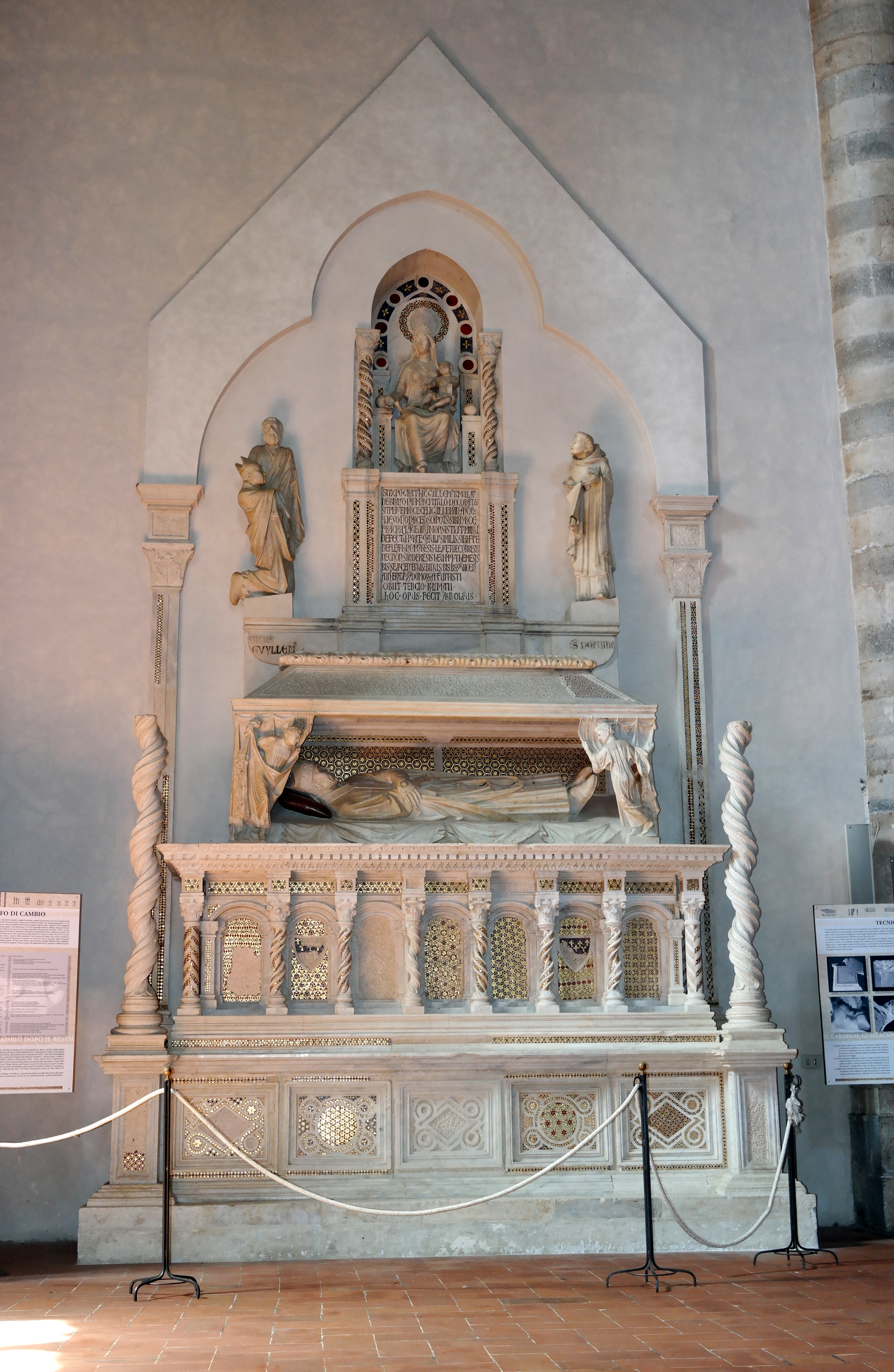 Mausoleo del cardinale De Braye, opera dello scultore Arnolfo di Cambio, all'interno della Chiesa di san Domenico a Orvieto